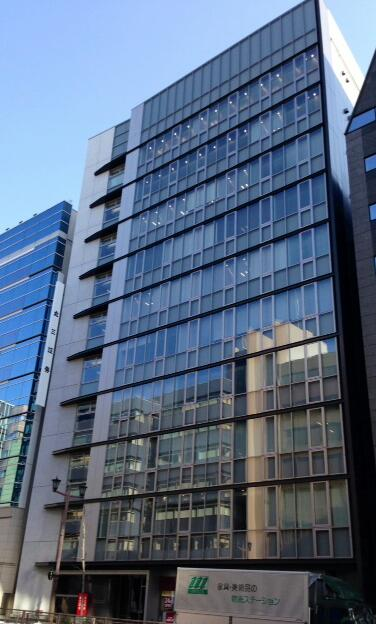 丸三証券本社ビル（麹町フロントビル）